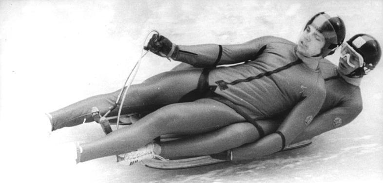 Hans Rinn, Norbert Hahn ADN-ZB Thieme str-8.1.1977-Bez. Karl-Marx-Stadt: DDR-Meisterschaften im Rennschlittensport-Die Olympiasieger im Doppel Hans Rinn und Norbert Hahn vom ASK Vorwärts Oberhof sicherten sich am 8.1. auf der Natureisbahn am Fichtelberg den Titel in ihrer Spezialdisziplin. Hans Rinn hatte zuvor auch schon Herren-Einzeltitel gewonnen.